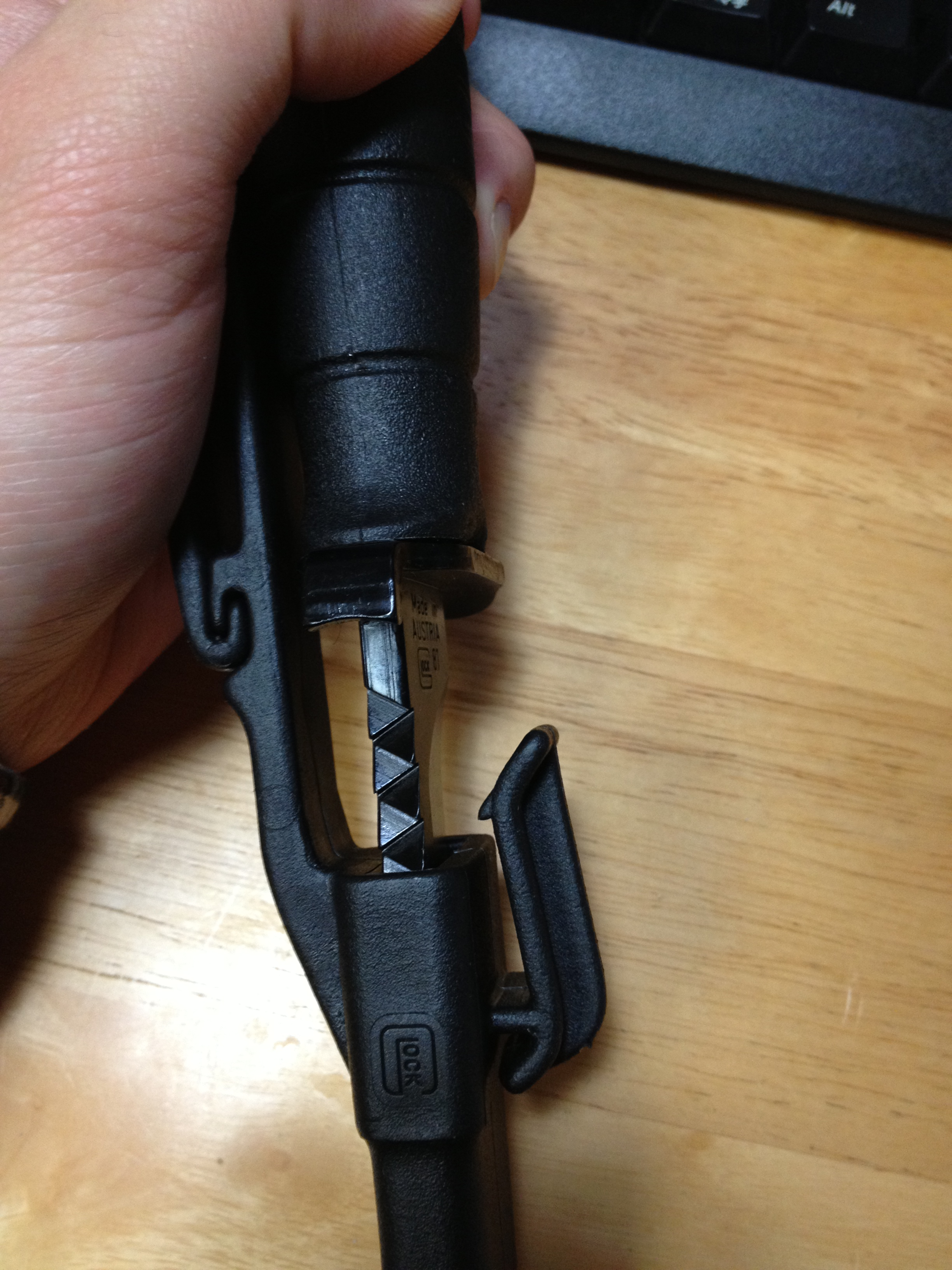 背側から見たFeldmesser81。シースのフック状構造がよく見える。